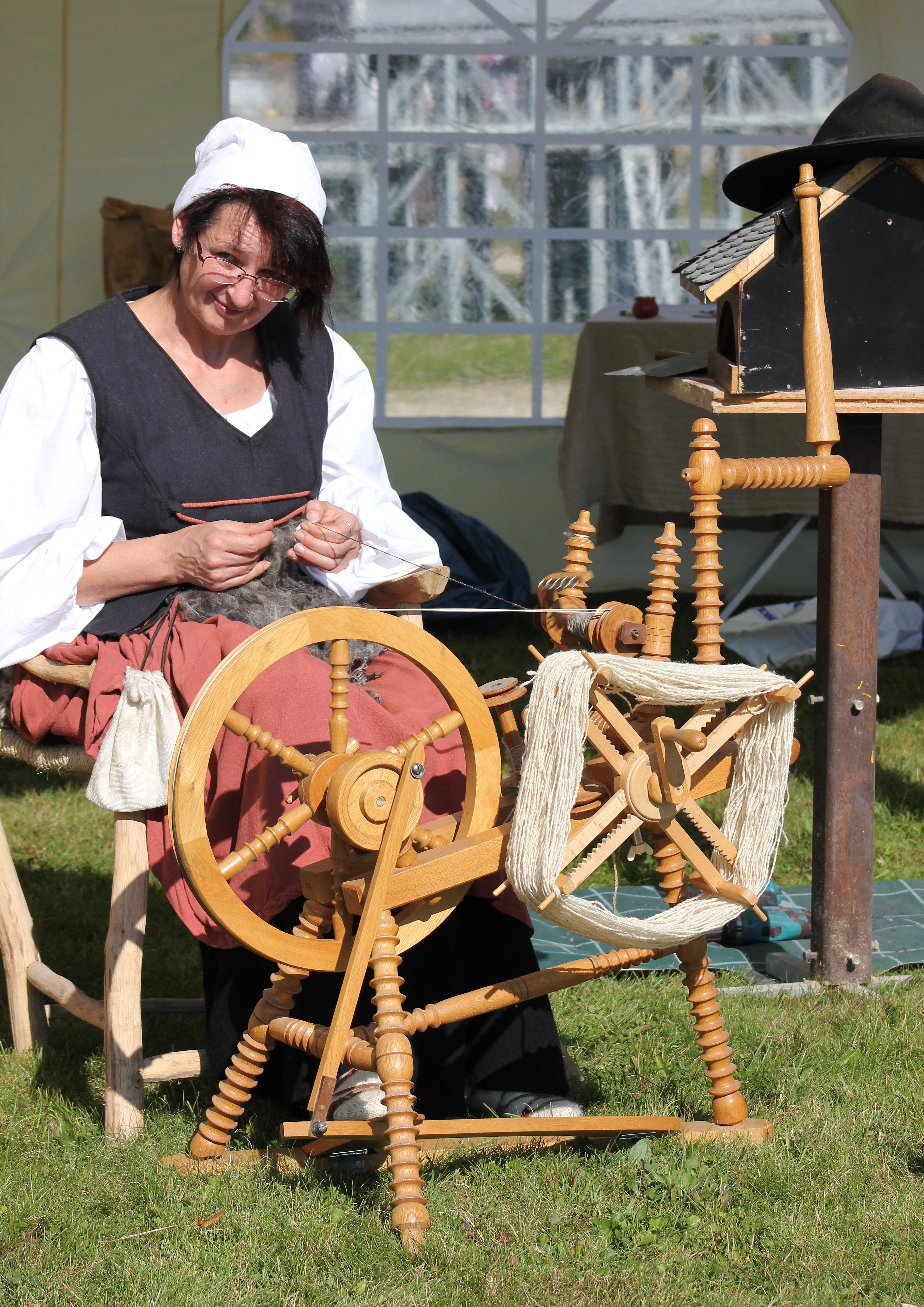 Erst durch das Spinnen wird die Wolle der Schafe zu einem Wollfaden mit dem man Stricken kann.